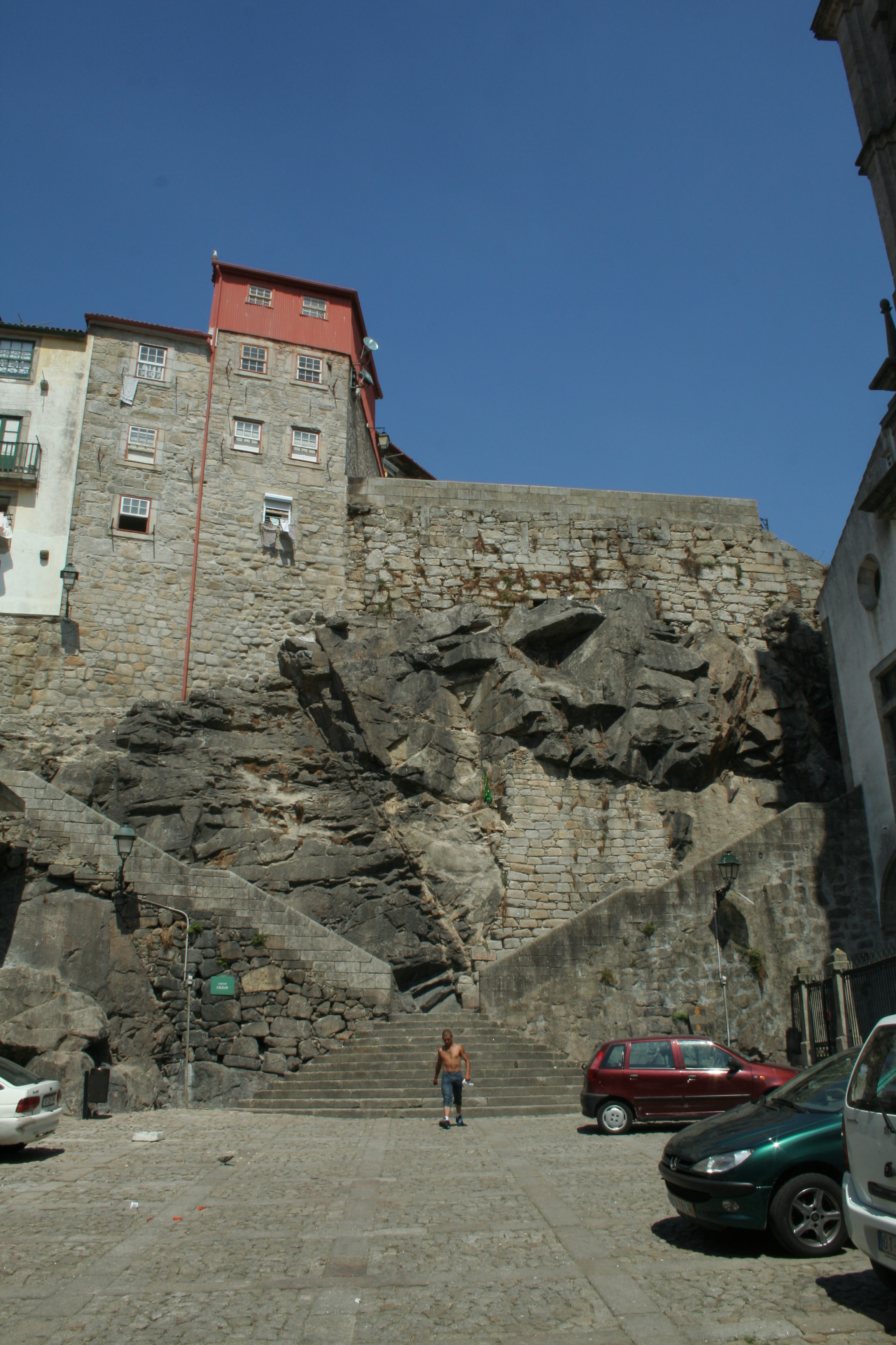 Escaliers à Porto, devant l'église des Jésuites.